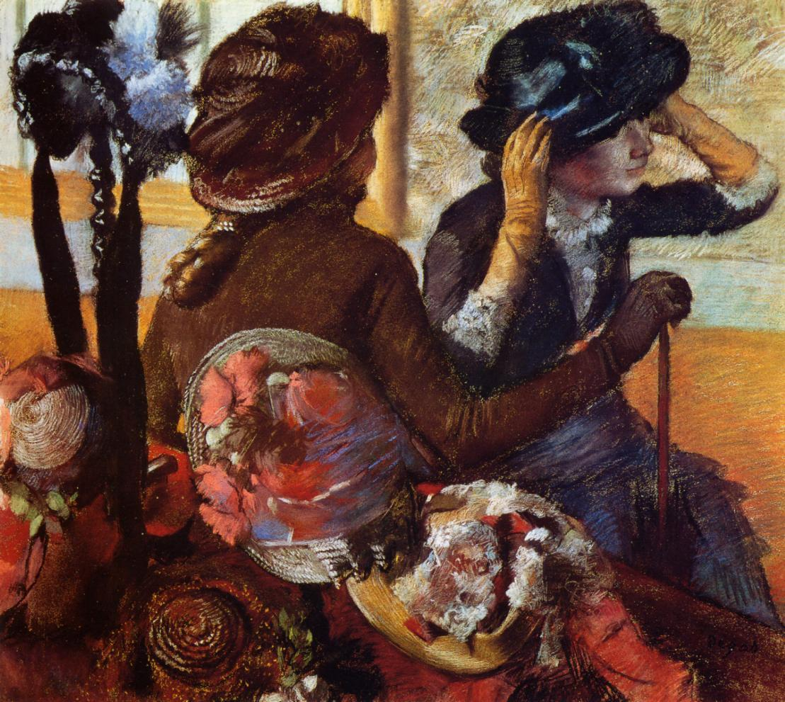 Bei der Modistin